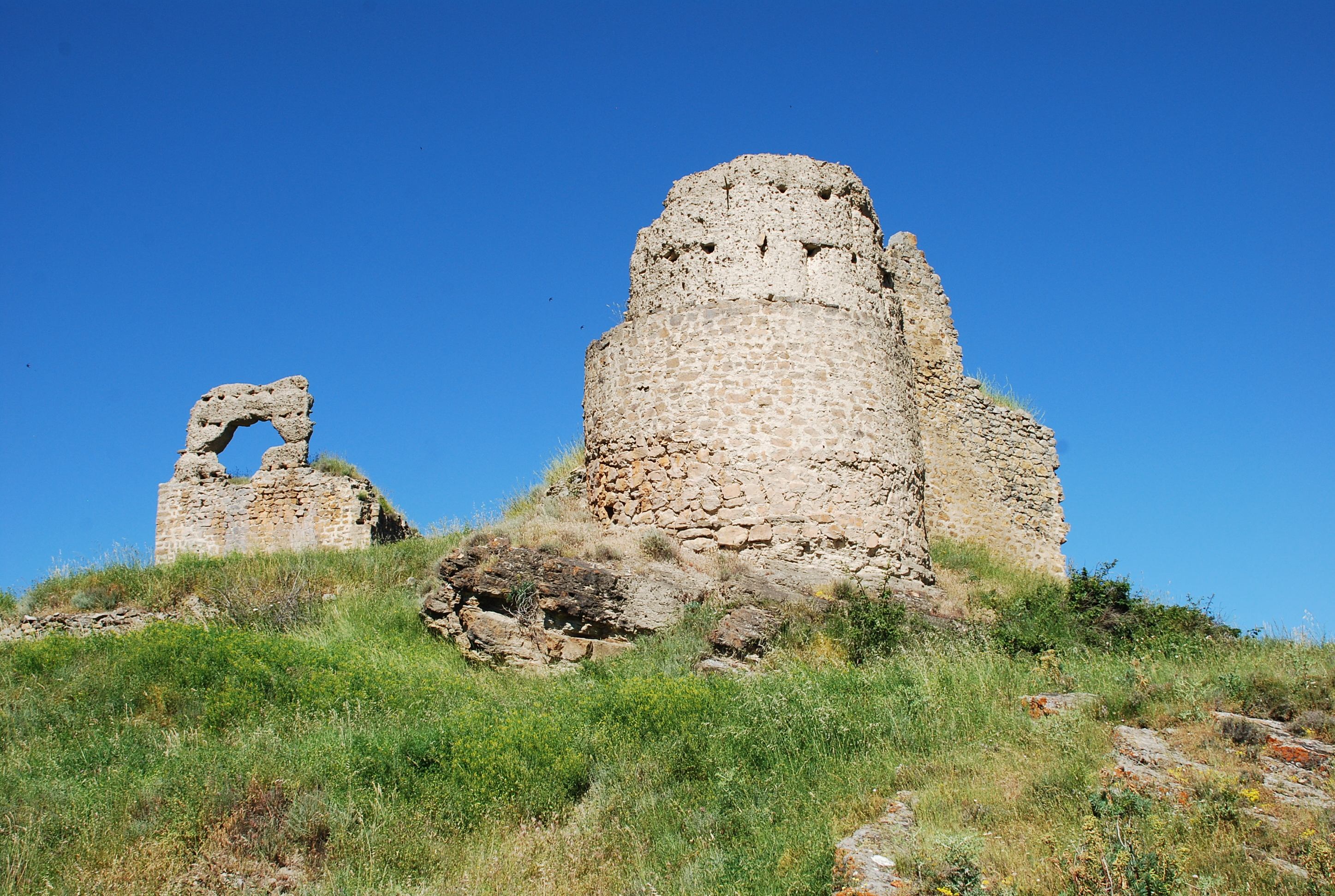 Castillo de Enciso en La Rioja (España)